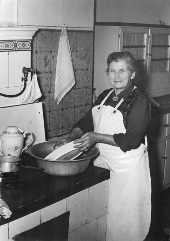 Berlin, Abwaschen Illus Junge 10.12.1951 Das Haus Christburgerstrasse 2 in Berlin hat schon seit den Weltfestspielen einen guten Namen. Auch beim Nationalen Aufbauprogramm wollen die Mieter nicht abseits stehen. UBz: Die 66jährige Frau Krüger verpflichtet sich, 50 Stunden am Nationalen Aufbauprogramm mitzuarbeiten. Als ehemalige Gesundheitshelferin wird sie sich auch beim Sanitätsdienst nützlich machen.